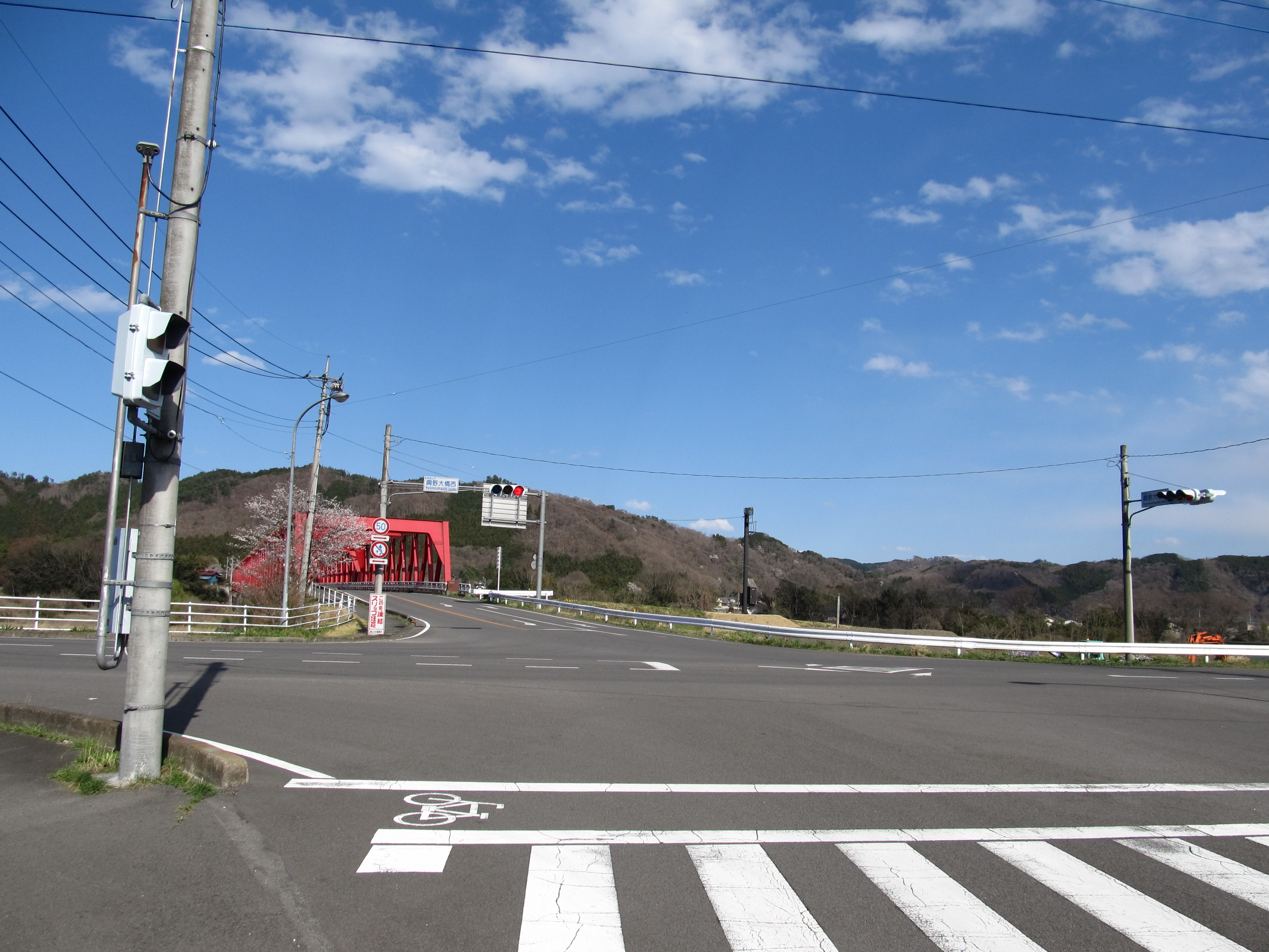 栃木県那須烏山市にある国道294号の興野大橋西交差点。栃木県道10号の終点であり、栃木県道27号の合流地点である。